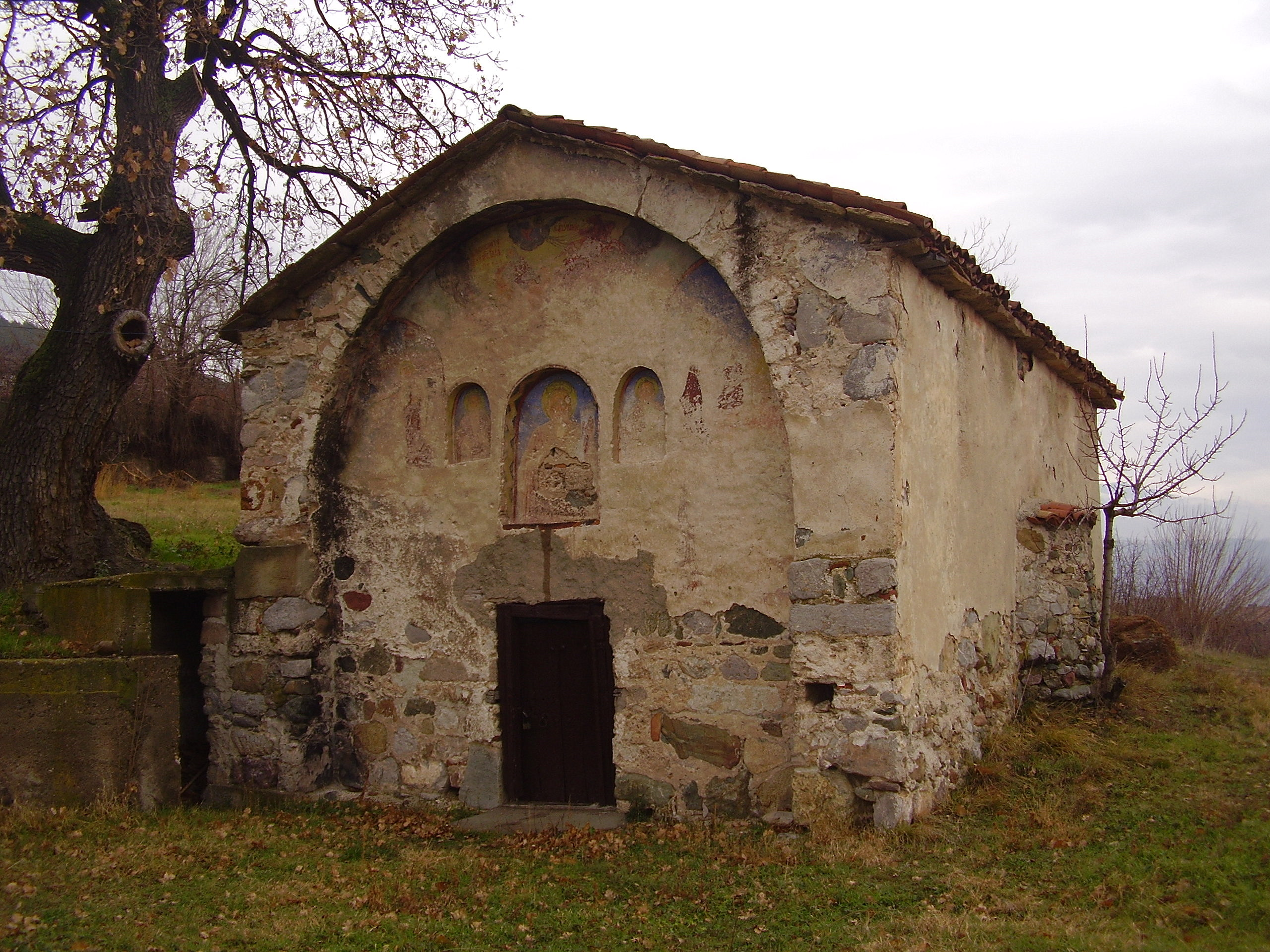 Късносредновековната църква Свети Илия - гр.Бобошево